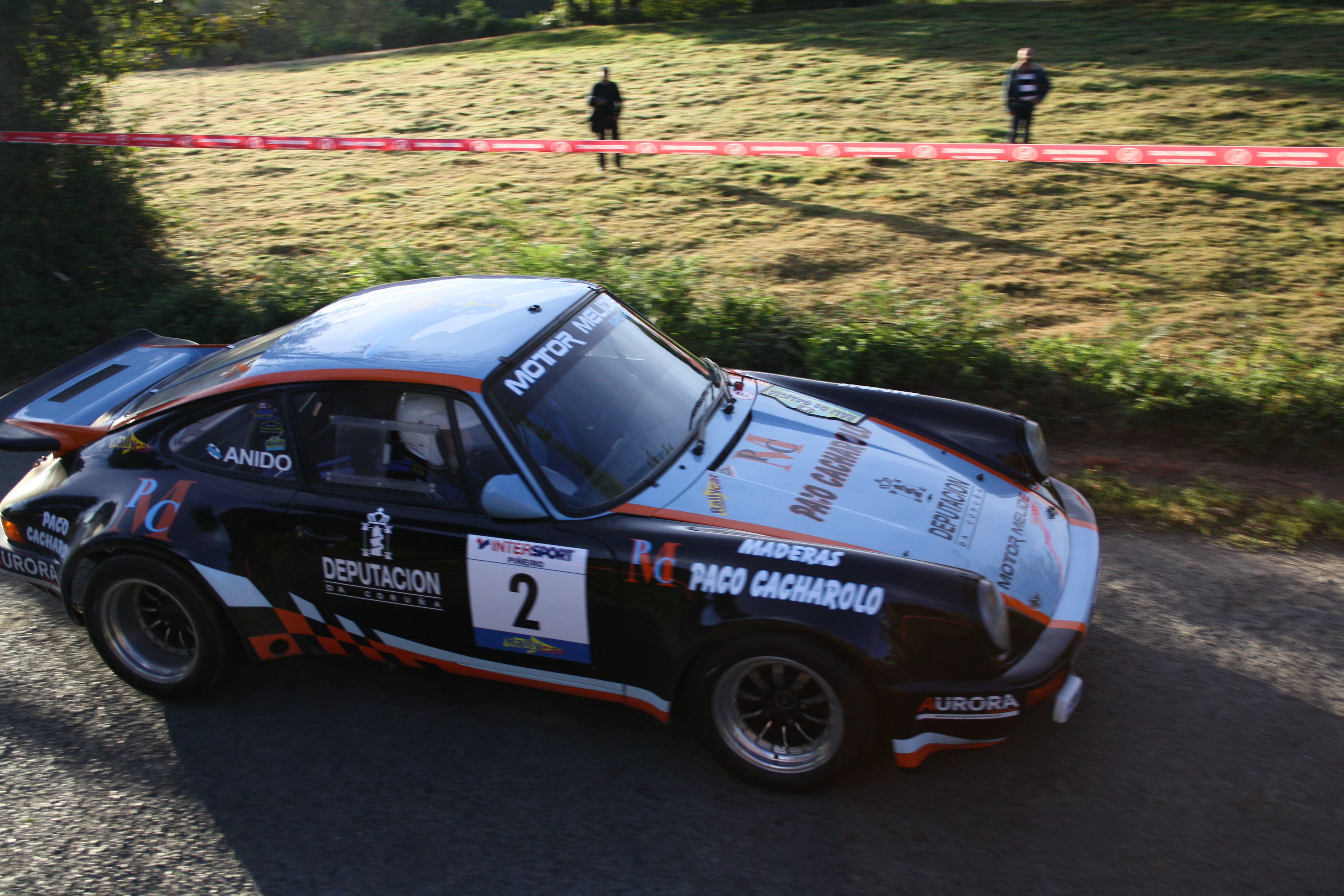 Rally de Galicia Histórico 2012